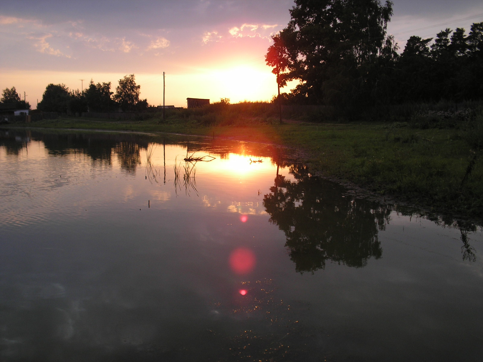 Клочки